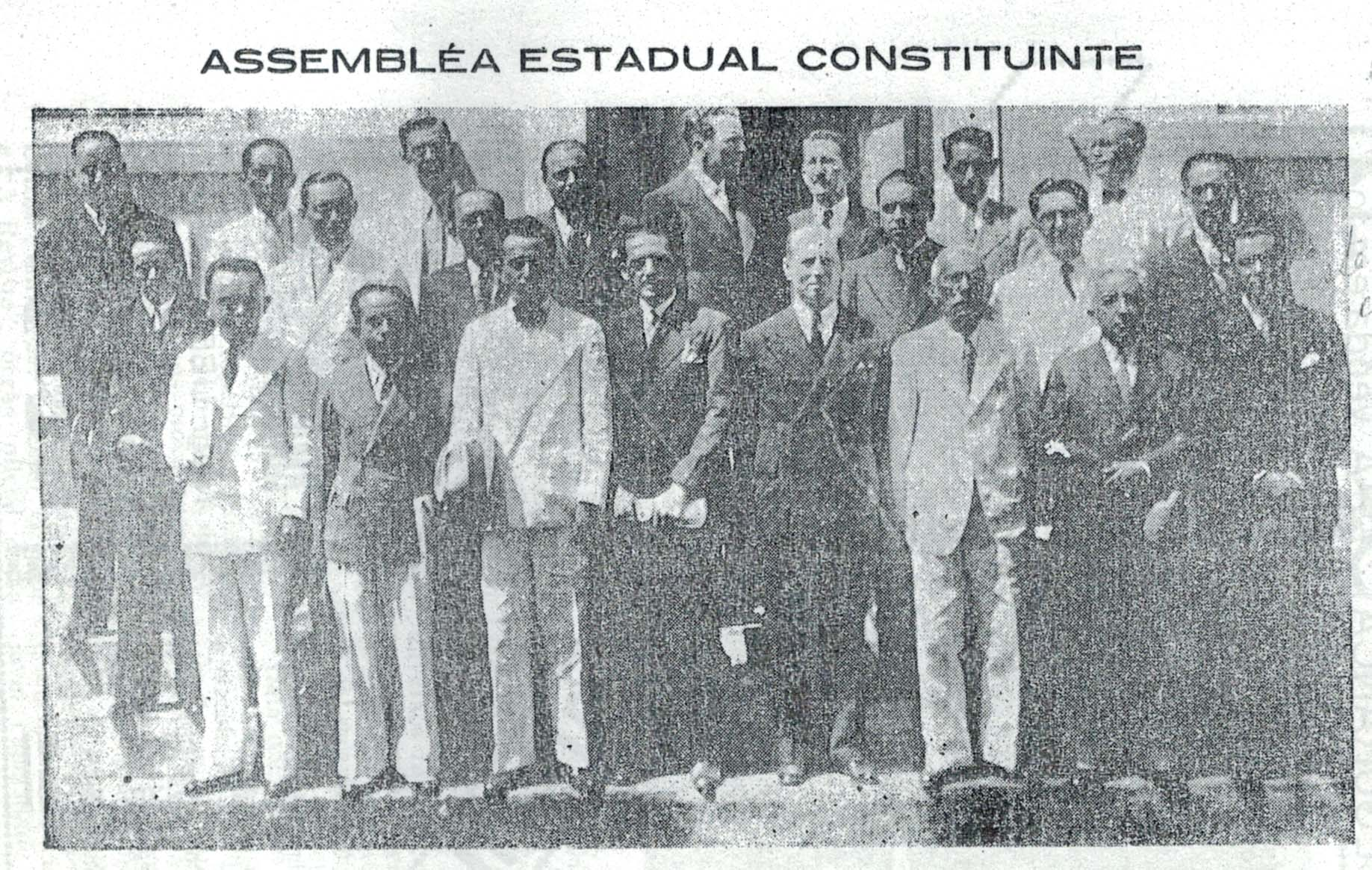 Os membros da Assembleia estadual Constituinte do Piauí de 1935 numa fotografia do dia 18 de julho de 1935. Um deles é Francisco Alves Cavalcante.